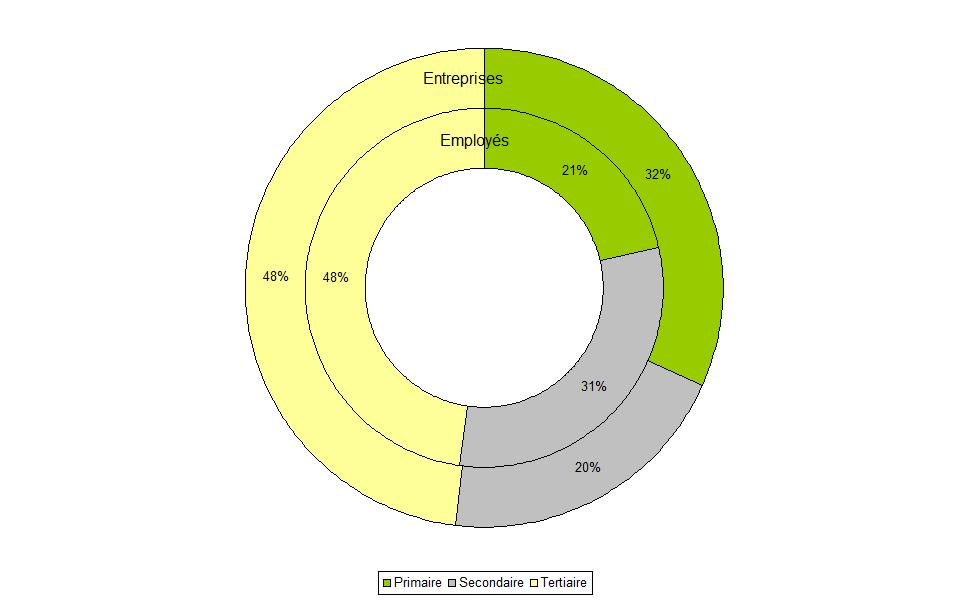 Répartition des entreprises et des emplois à Meikirch (canton de Berne, Suisse), en 2009.